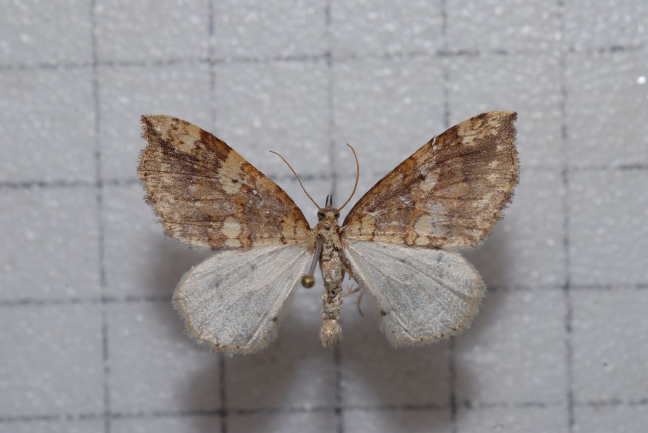 Idiotephria nakatomii Inoue, 1978 黃珠斑殊尺蛾 鞍1:P.57,Pl.13-13 Idioterphria nakatomii Inoue 1978 (TaiBnet)